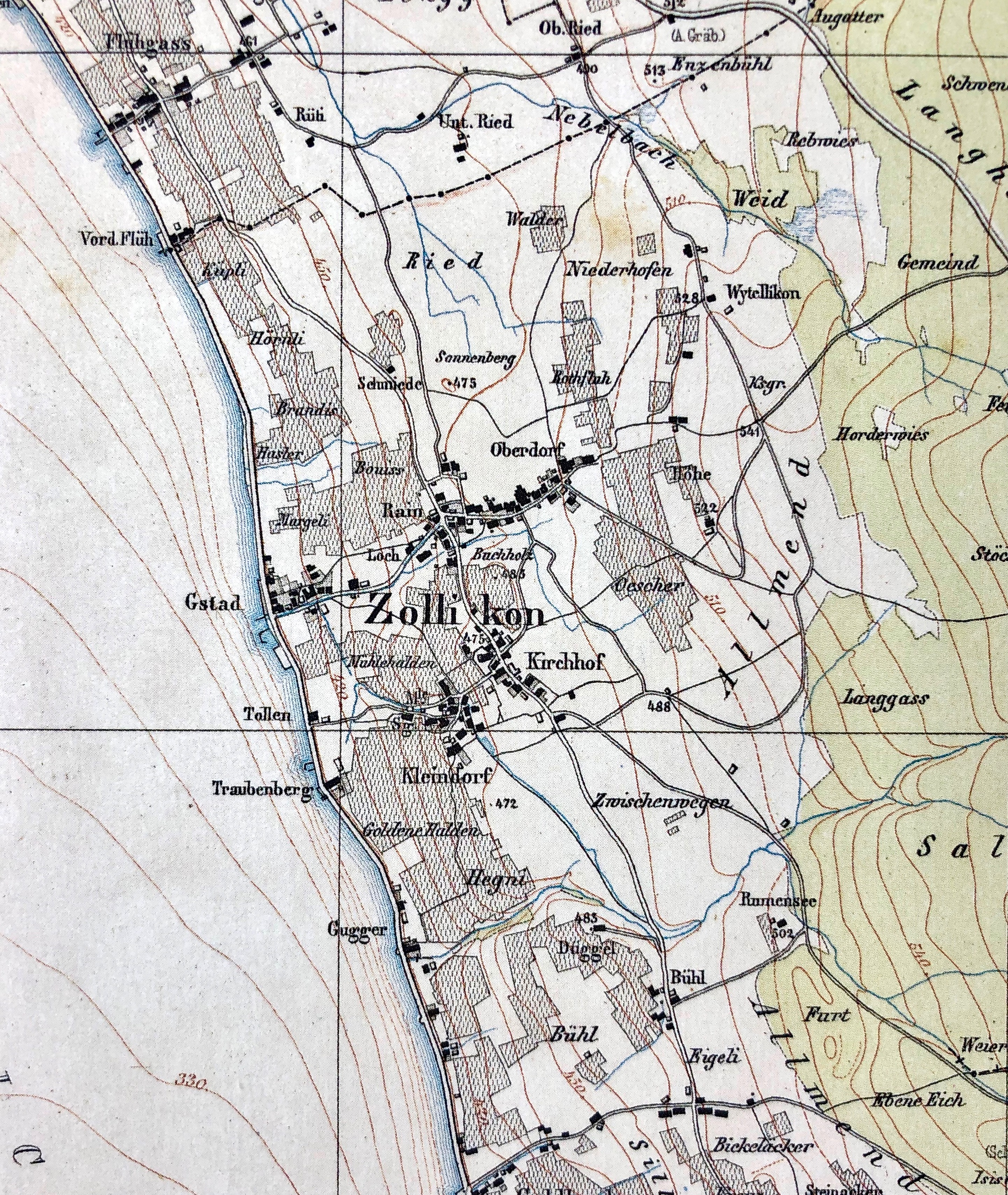 Zollikon auf der Karte von Johannes Wild (Kartograf)